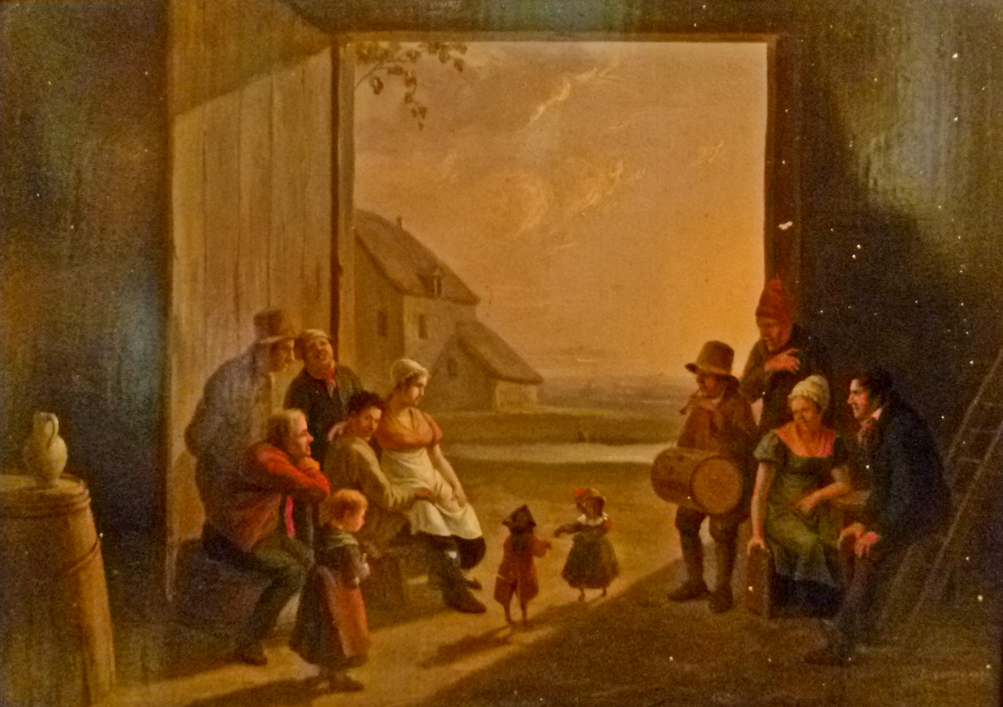 "Geanimeerd gezelschap met dabsende aapjes" (1823), olieverf op paneel (26 x 33 cm) door Constantin Fidèle Coene (1779-1841); leraar aan de academie van Brussel; privébezit